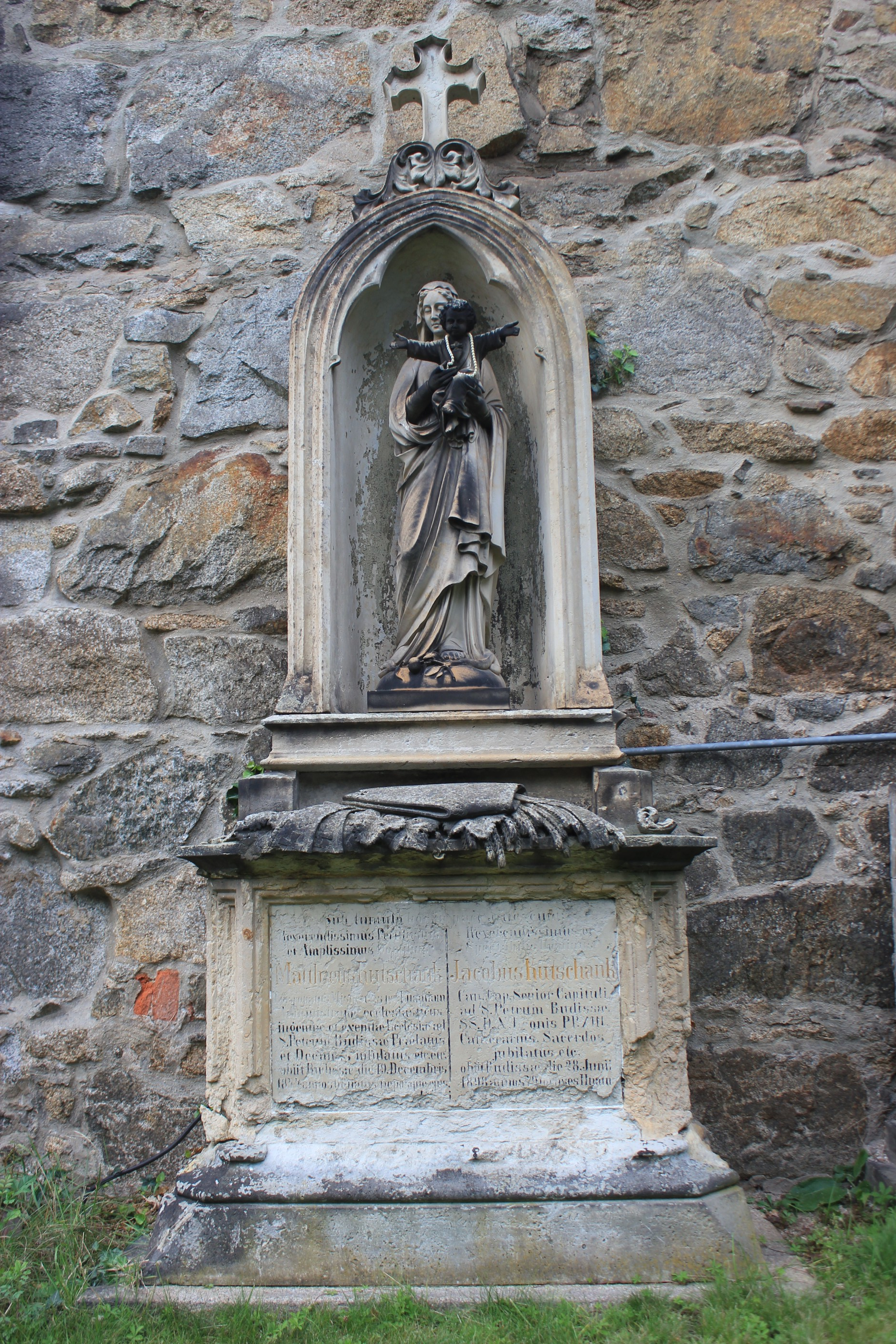 Hornjoserbsce: Row Mateja a Jakuba Kućanka na Budyskim Mikławšku.